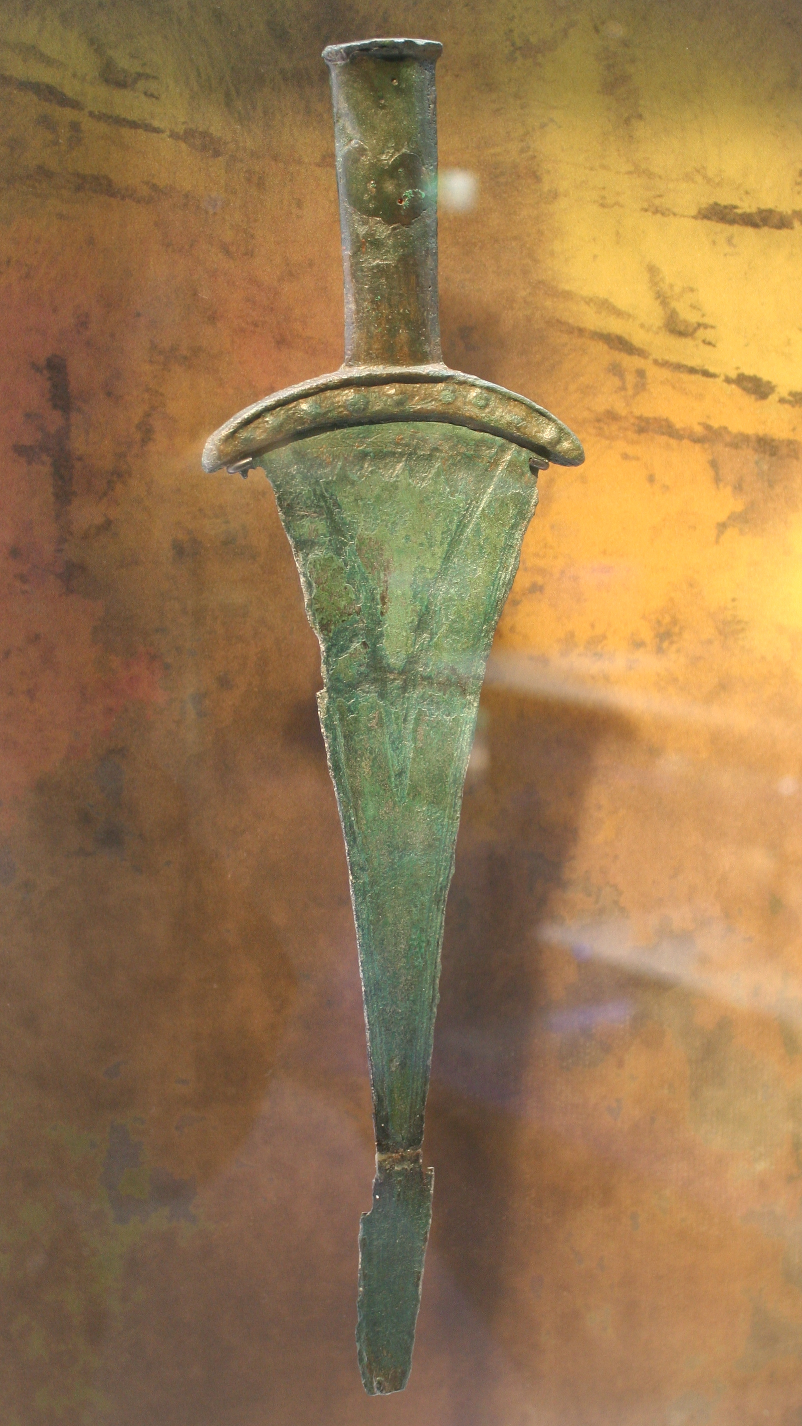 Vollgriffdolch südpommerschen Typs der Aunjetitzer Kultur aus Dresden-Briesnitz, 2200-1600 v. Chr.; Staatliches Museum für Archäologie Chemnitz